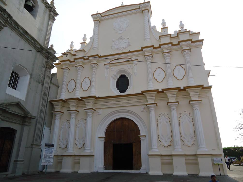 La Mereced iglesia León, Nicaragua por Richard Weiss